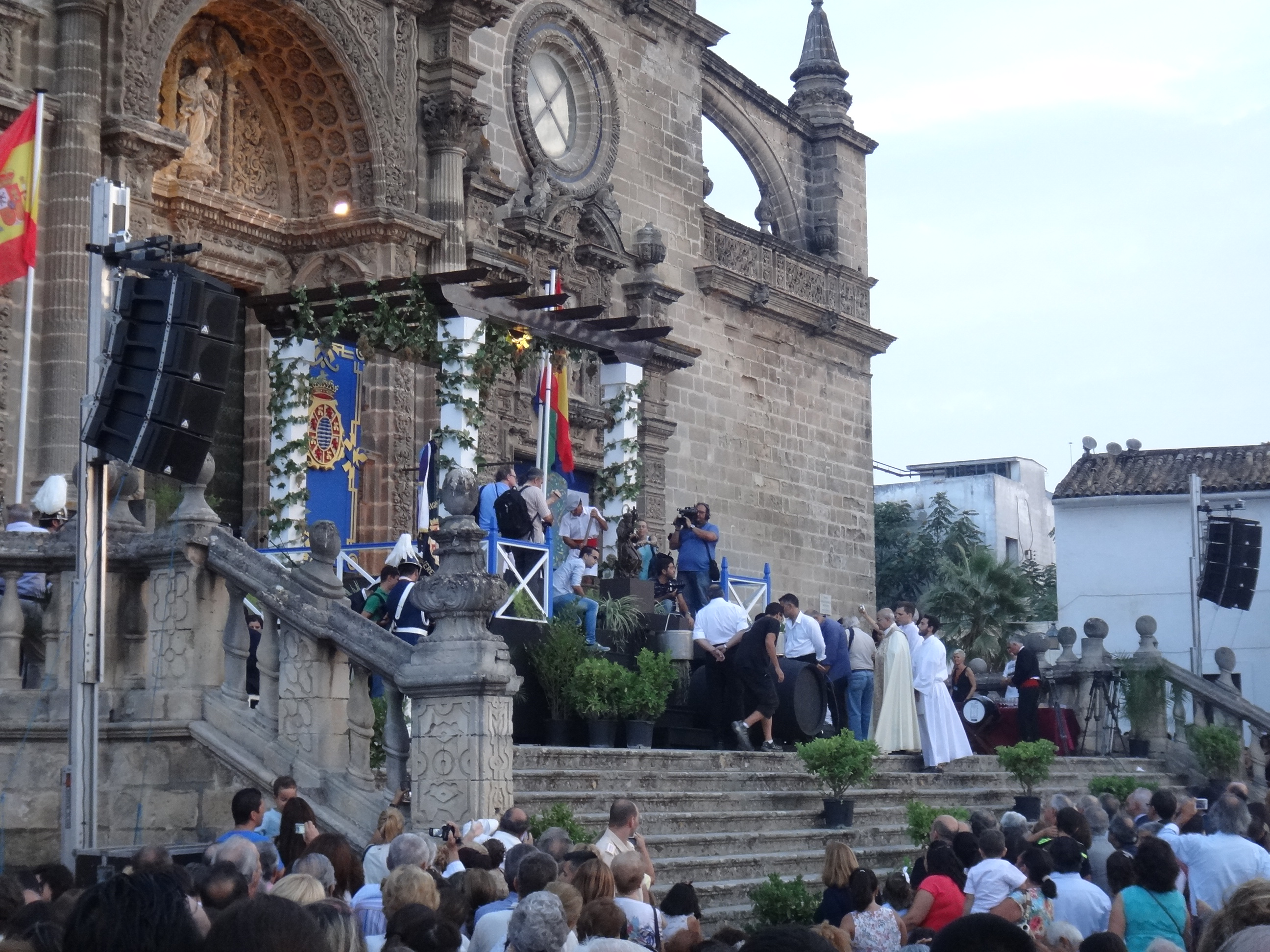 Catedral de Jerez de la Frontera en la Feria de la Vendimia 2015